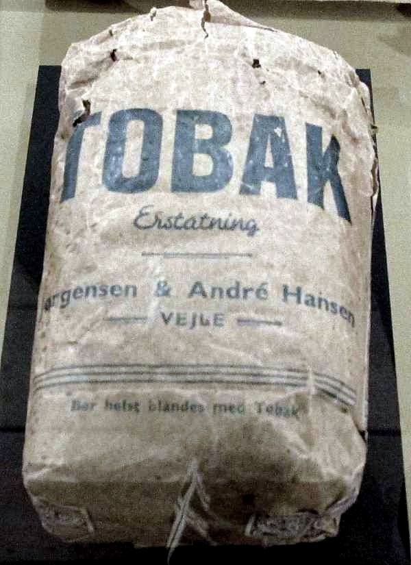 Tobakserstatning (bør helst blandes med tobak!)